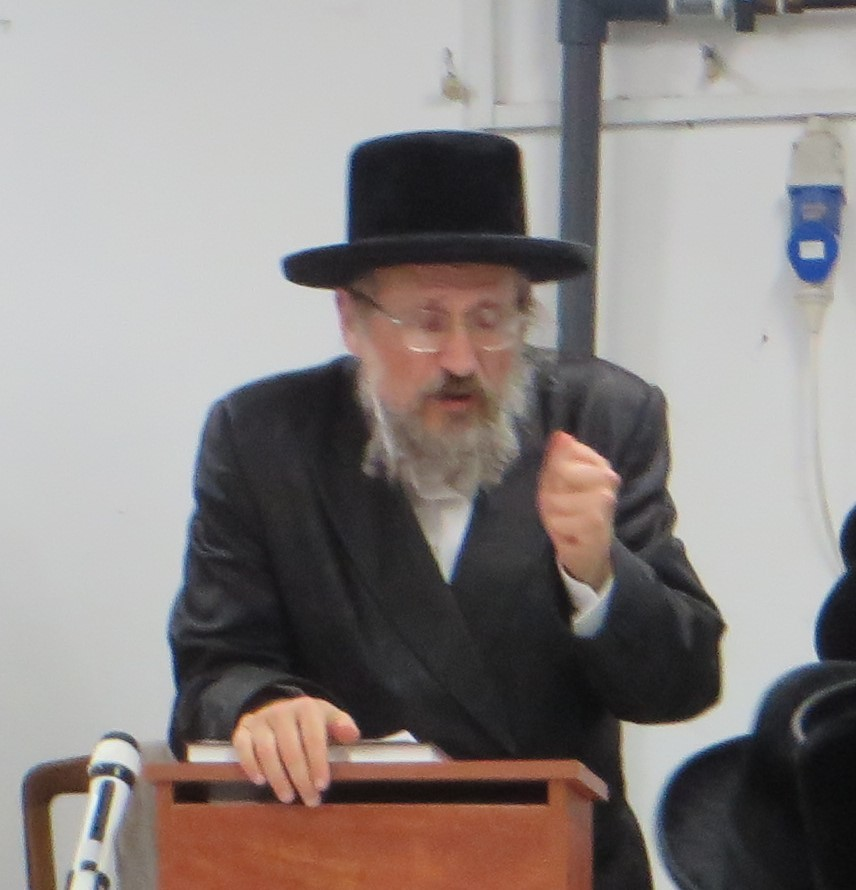 האדמו"ר מאטניא הרב ברוך הגר שליט"א נואם בסעודת הילולא לאדמו"ר רבי ישראל שלום יוסף הגר מאנטניא (נפש יש"י) הי"ד, אור לכ"ד באייר תש"פ